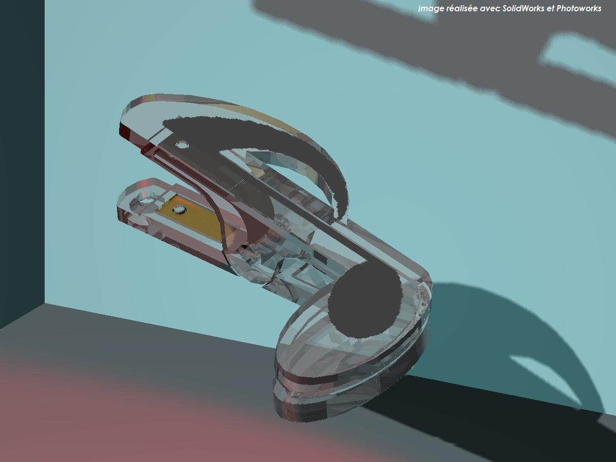 Image de synthèse réalisée avec le modeleur SolidWorks et son éditeur de texture intégré PhotoWorks. Réalisée en 3 heures environ (modèle 3D + texture). auteur Olivier Ruiz France Cet objet comporte de plus un "décalque" (croche collée sur la face supérieure).